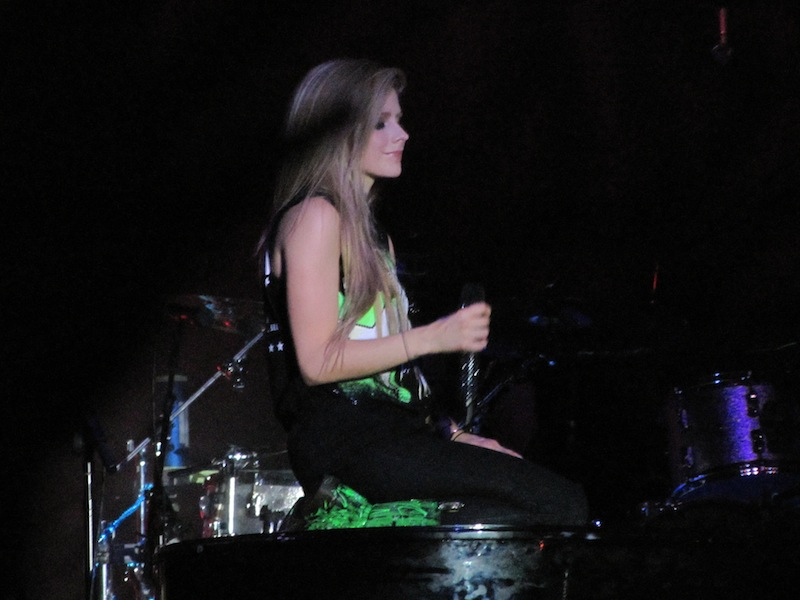 Avril Lavigne em Belo Horizonte, Brasil.